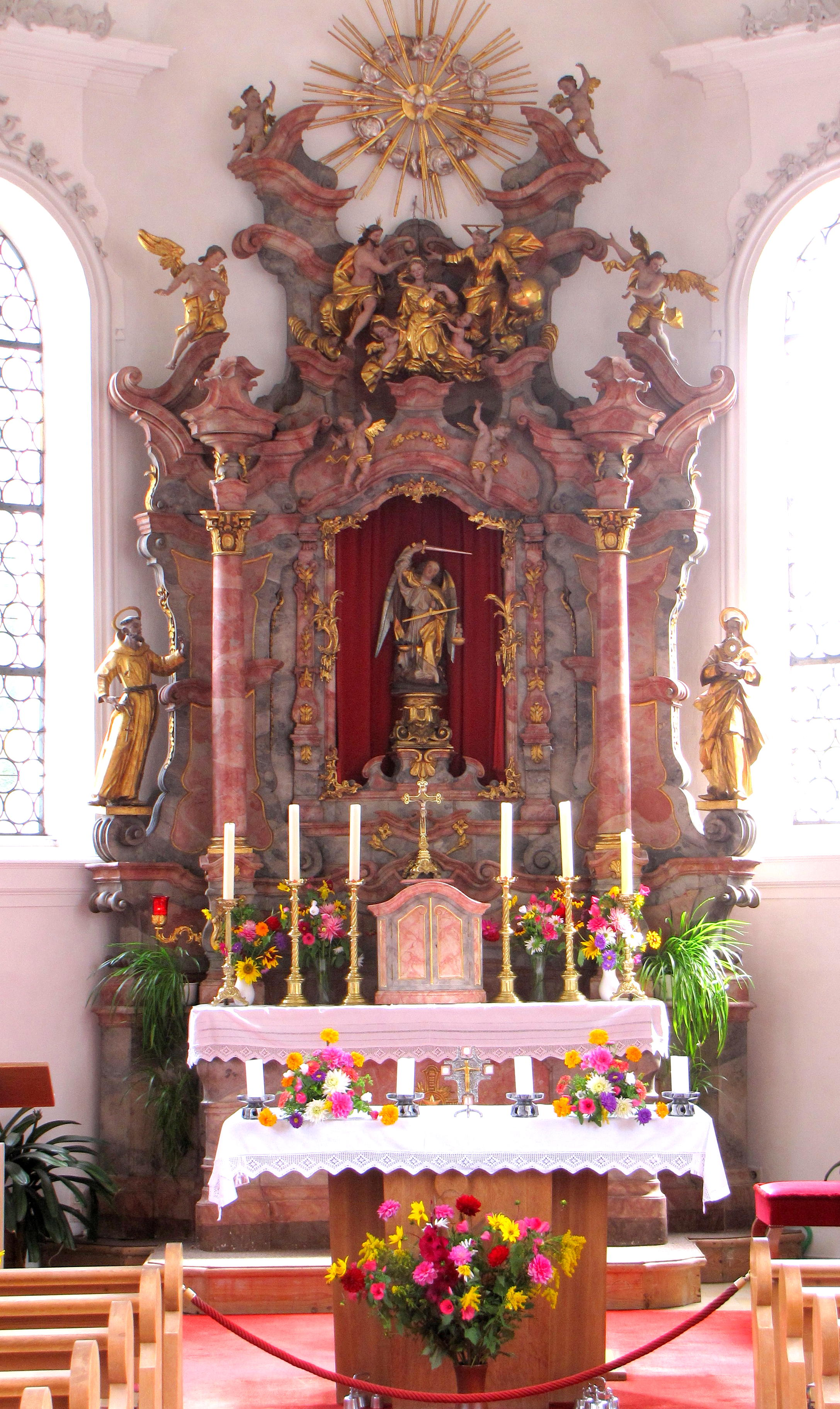 Hochaltar der Filialkirche St. Michael in Pfronten-Steinach von Joseph Stapf